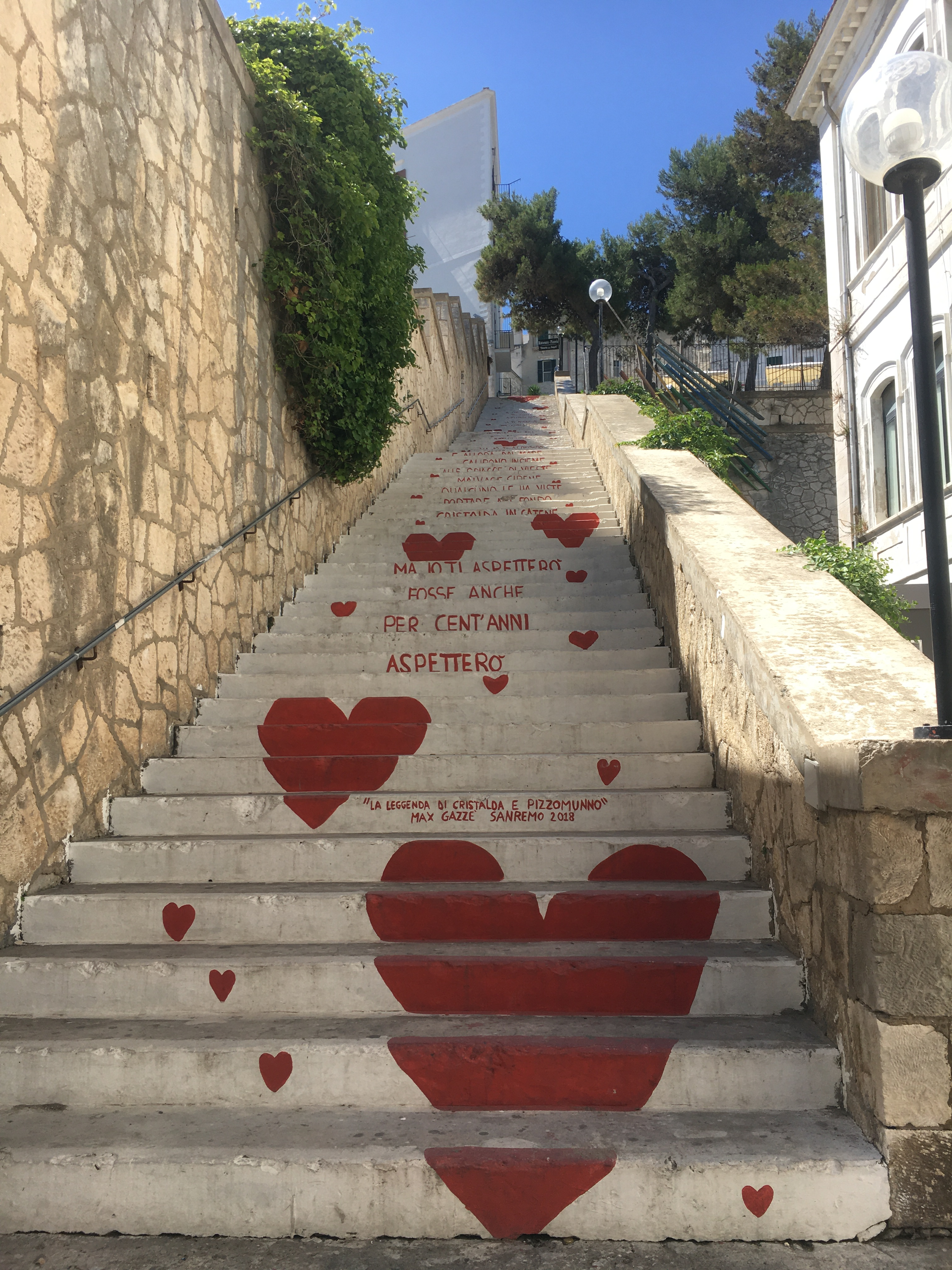 La scalinata dell´amore